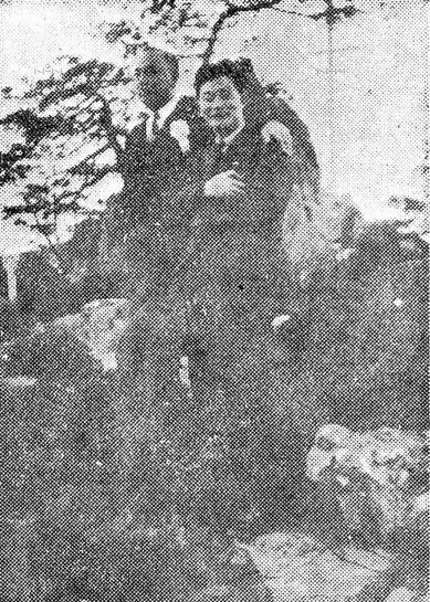 1940년대 몽양 여운형과 김윤근